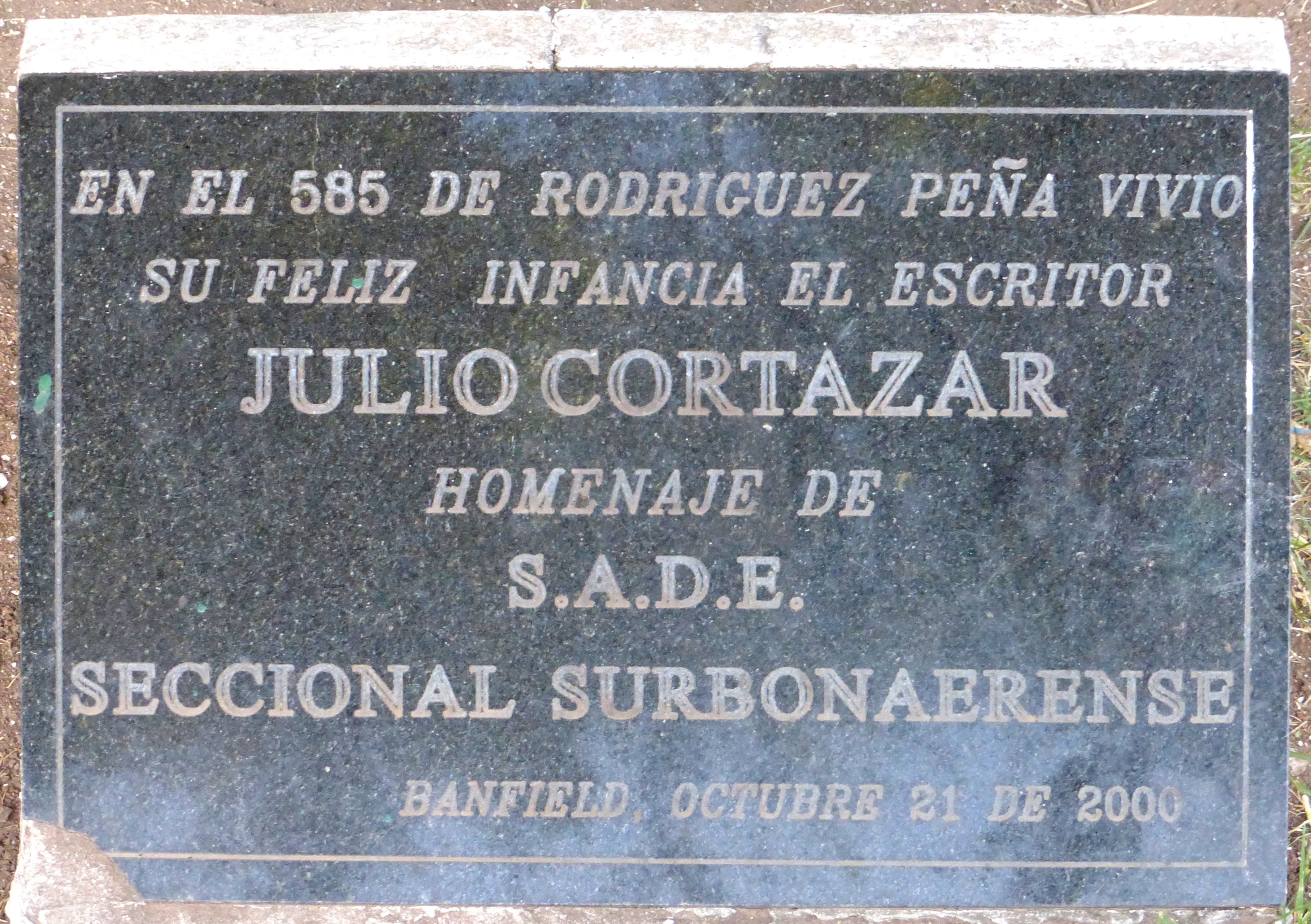 Placa en conmemoración a Julio Cortázar en la Plaza Alfredo De Angelis de Banfield, Argentina.